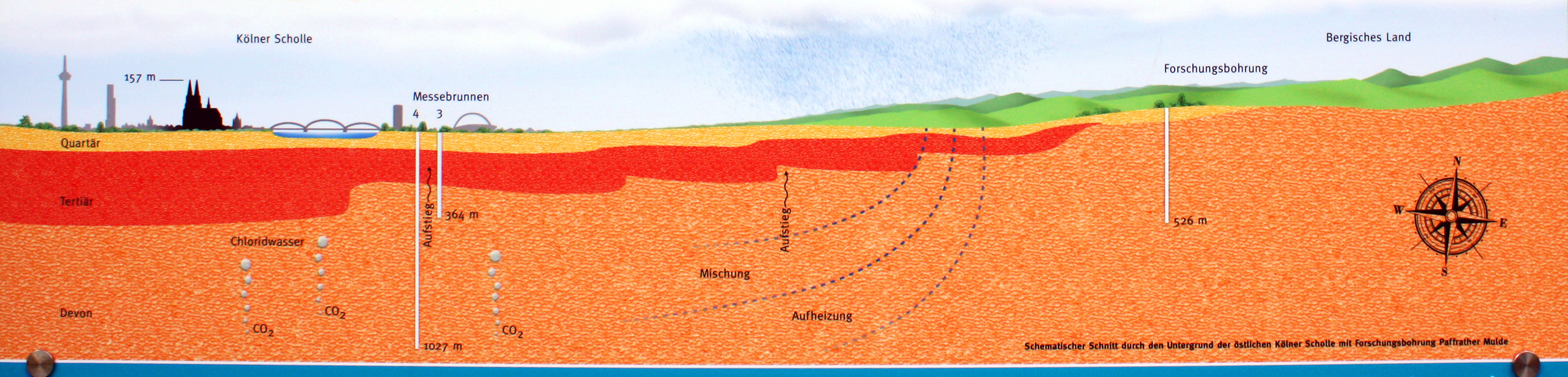 Informationen zu den Bohrungen der Messebrunnen (Ausschnitt). Schautafel vor der Claudius-Therme, Köln Deutz an der Sachsenbergstraße